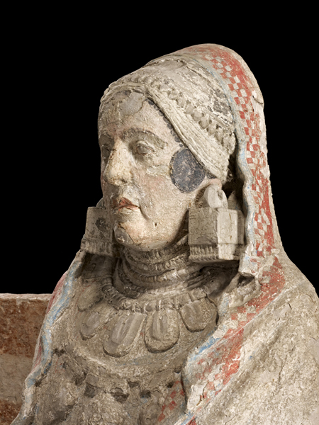 Dama de Baza (Cultura Ibérica). Número de inventario: 1969-68-155-123A.